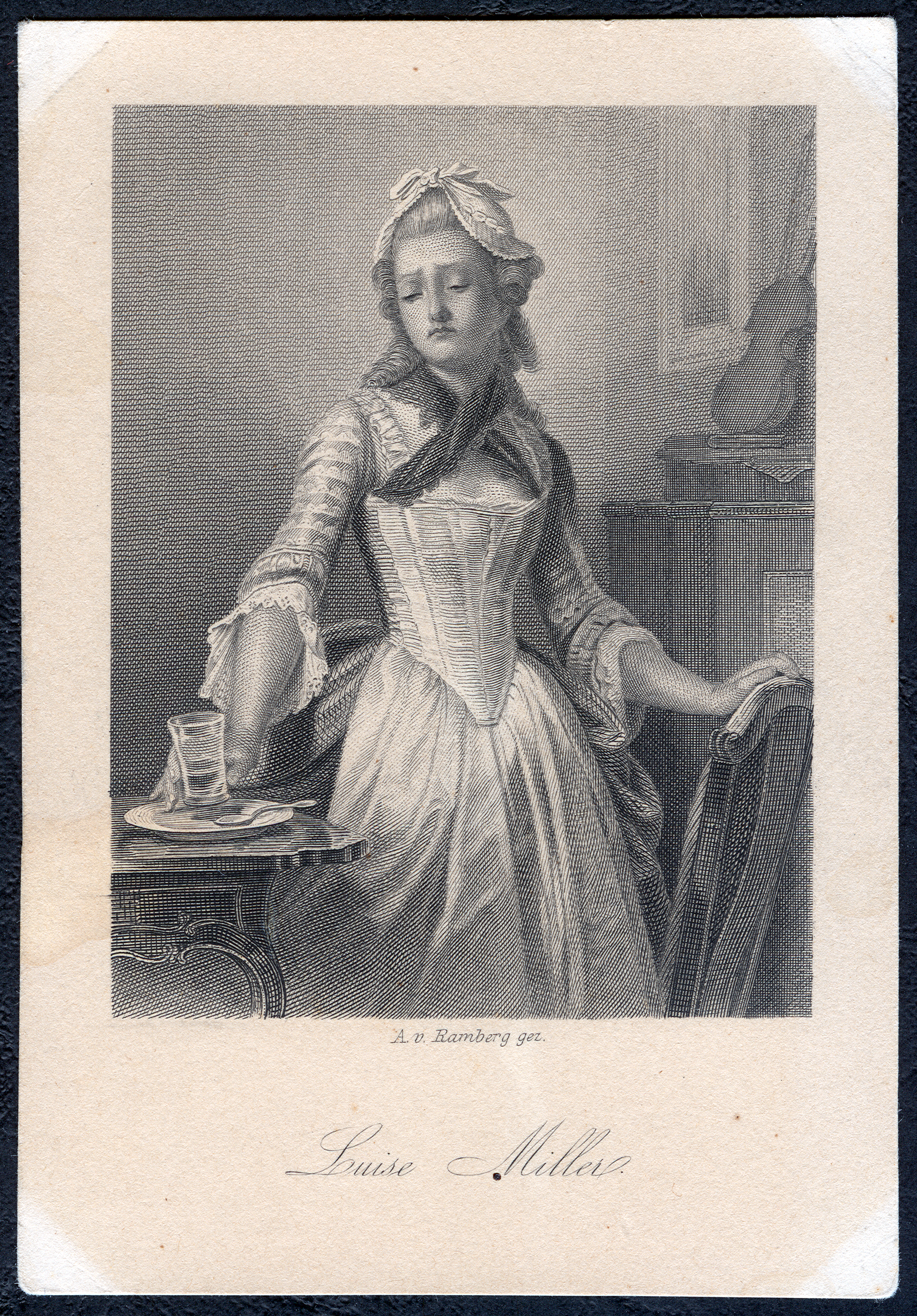 Luise Miller' aus Friedrich Schillers Kabale und Liebe, als Stahlstich gestochen von Conrad Geyer um 1859 nach einer Zeichnung von Arthur von Ramberg; das untertitelte Blatt hat die Maße von circa 8 cm x 11,6 cm und auf der Rückseite keine weiteren Angaben. Es gehört zu einer Serie, möglicherweise als frühes Sammelbild, die als Schiller-Galerie von Friedrich Pecht und von Arthur von Ramberg bekannt geworden ist.